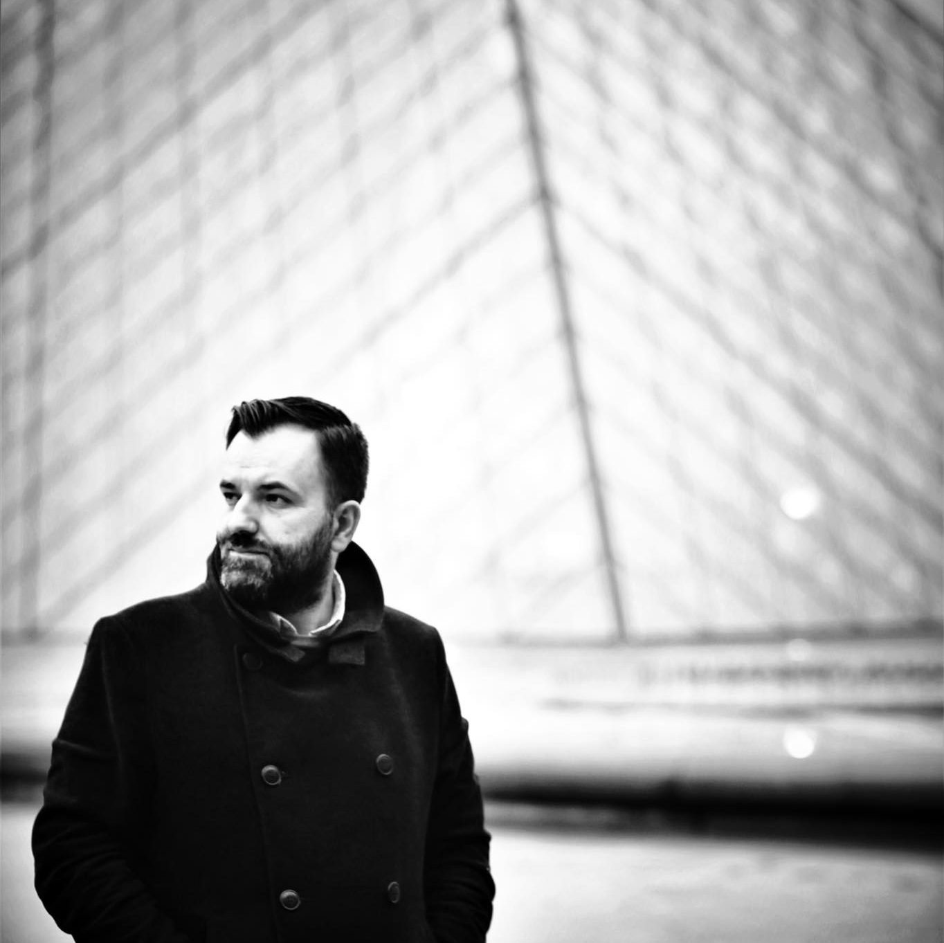 Paris, 2019